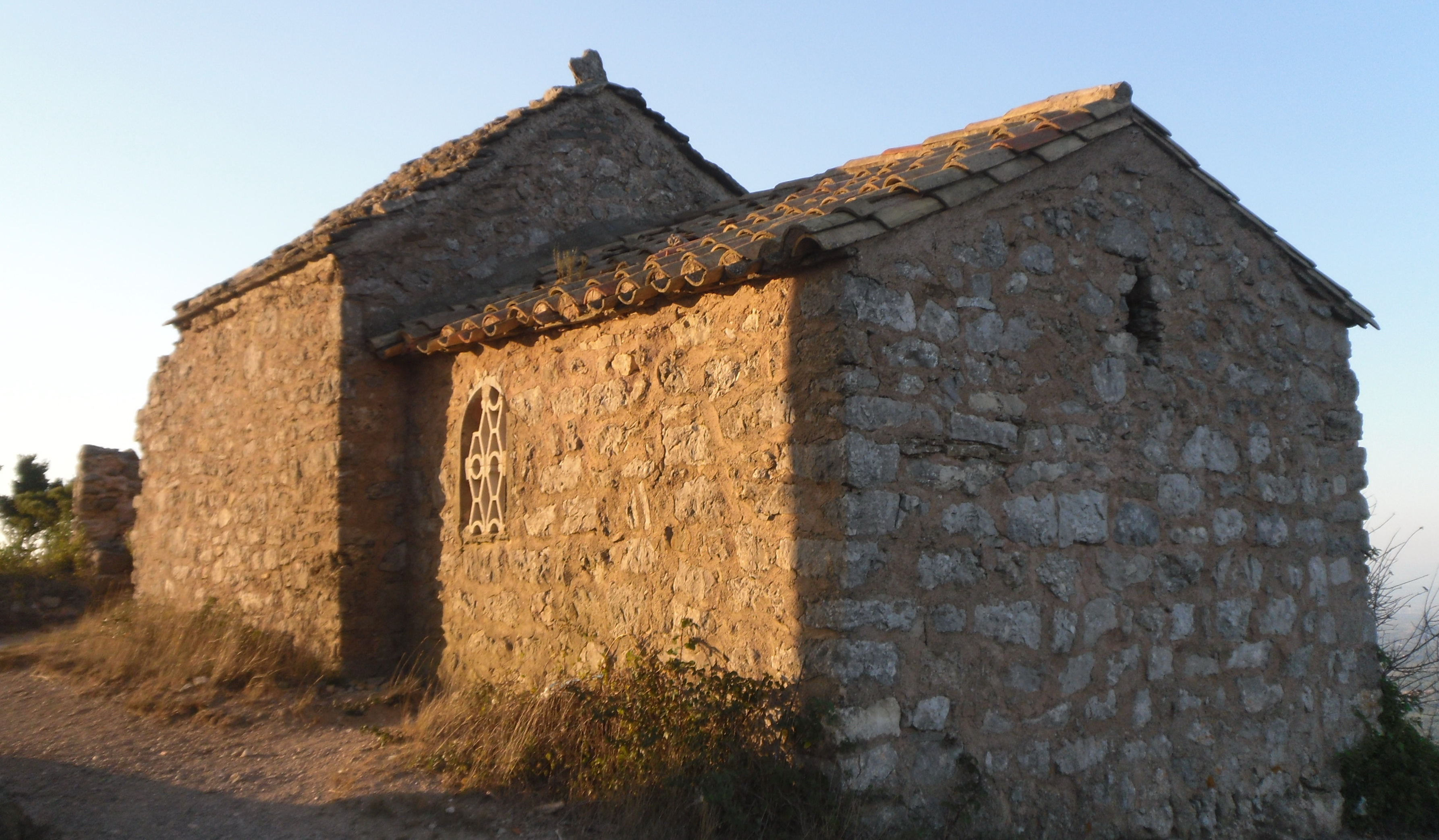 Ermitage Saint-Victor à Fontjoncouse